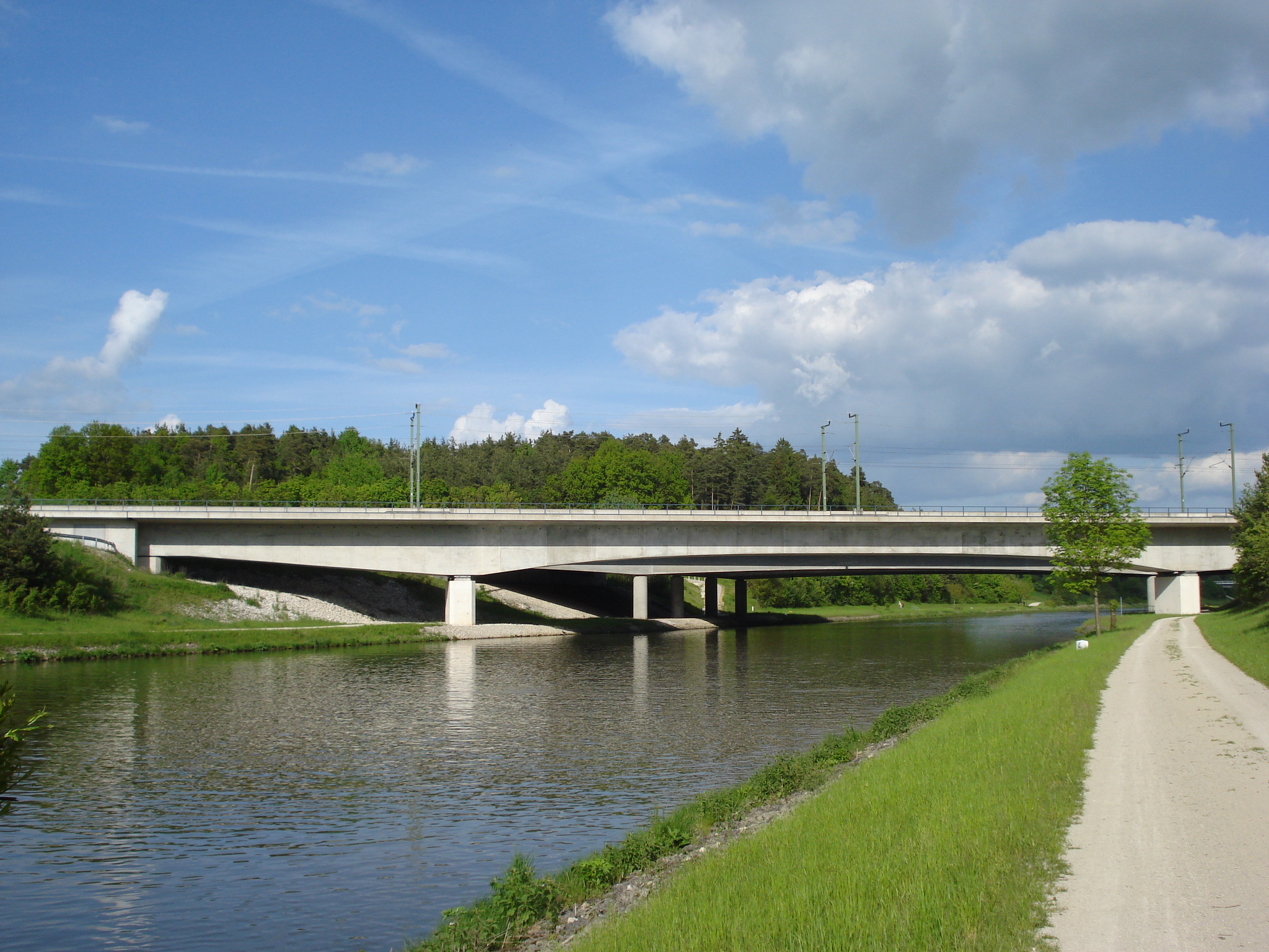 Die Brücke der Schnellfahrstrecke Nürnberg-Ingolstadt über den Main-Donau-Kanal bei Hilpoltstein im Mai 2010.